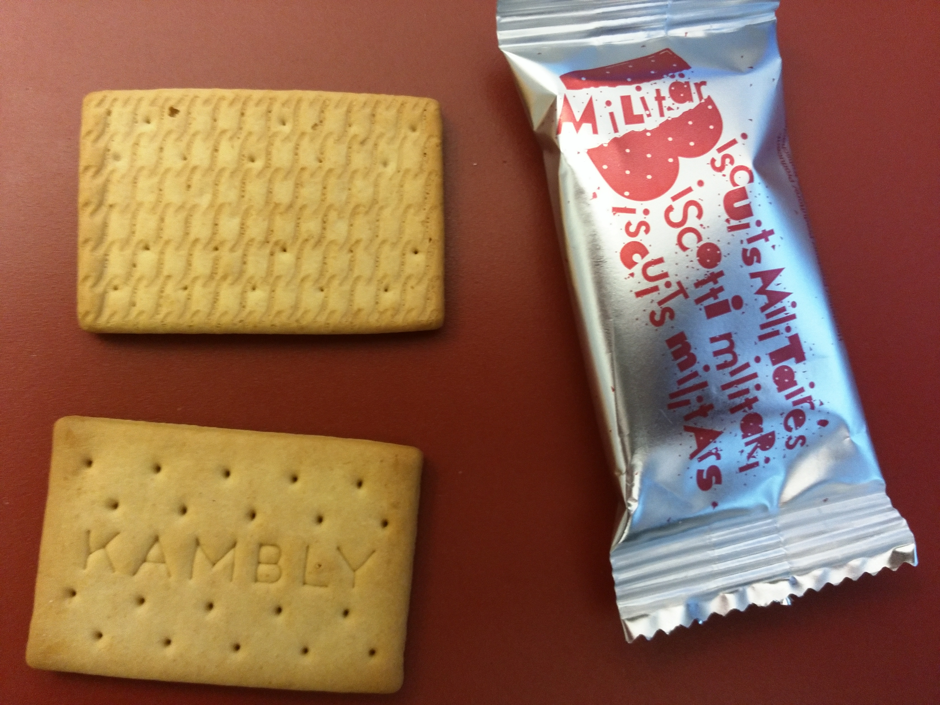 Schweizer Militärbiscuits mit Verpackung